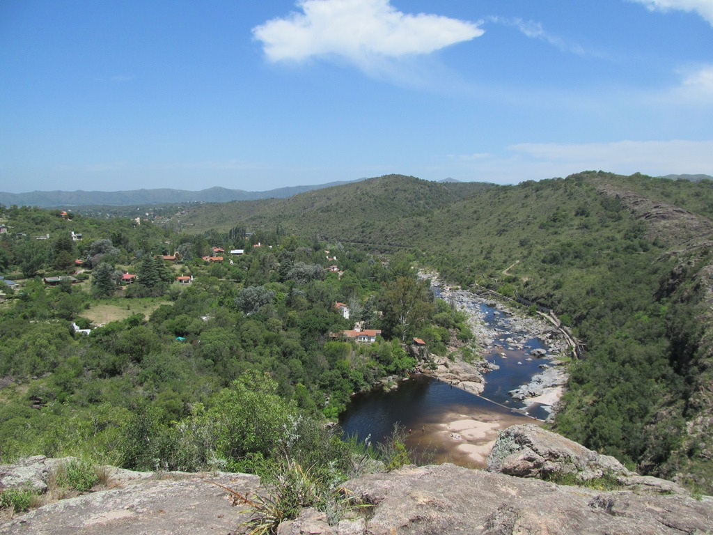 Rio San Antonio pasando por Cuesta Blanca.